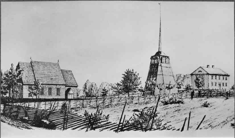 Kyrkan och dess omgivning, klockstapel. Foto efter teckning av Sven Andersson 1870. Kyrkan revs 1887. Kategori: (01) ExteriörerKyrkan och dess omgivning, klockstapel. Foto efter teckning av Sven Andersson 1870. Kyrkan revs 1887.